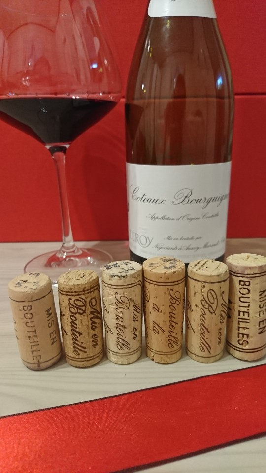 코르크 마개에 설명